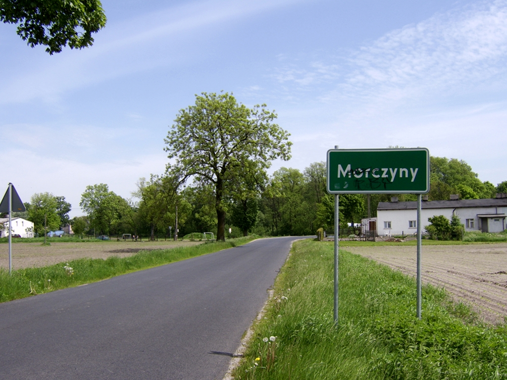 Tablica miejscowości